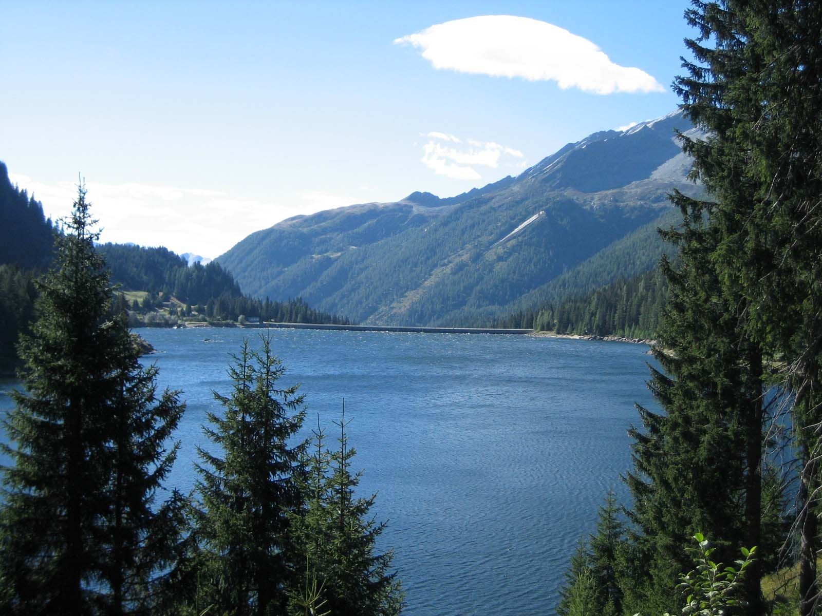 Lago d'Isola südlich von San Bernardino